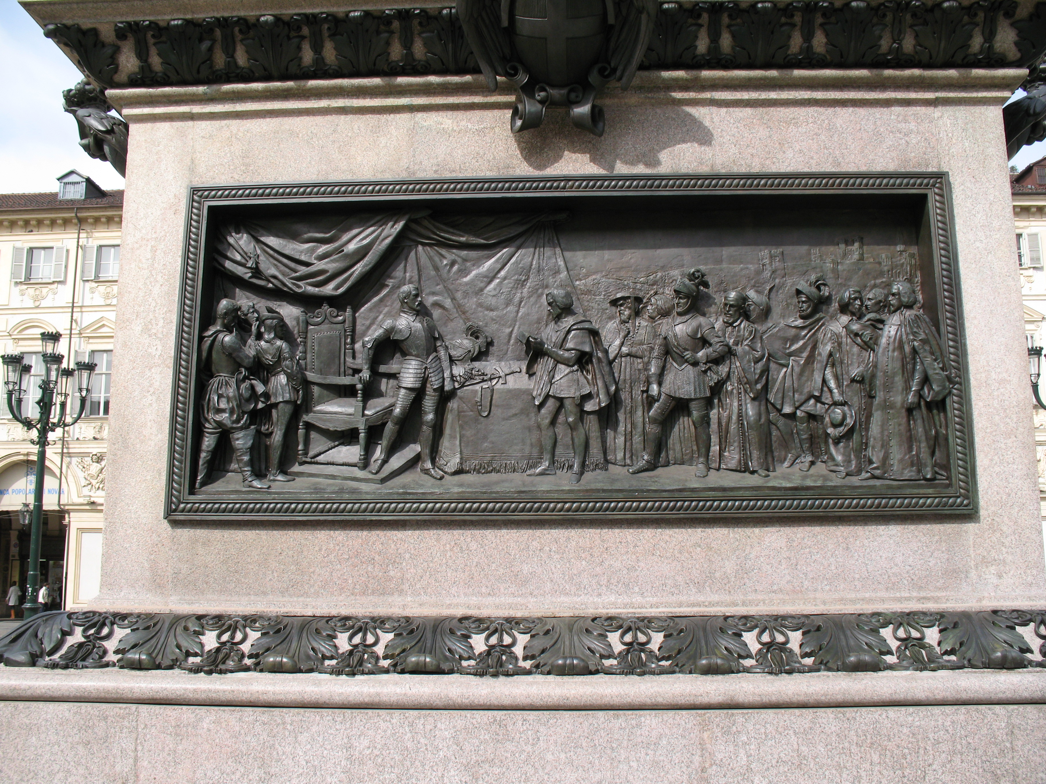 Statua equestre ad Emanuele Filiberto di Savoia - Piazza san Carlo - Torino - Italy